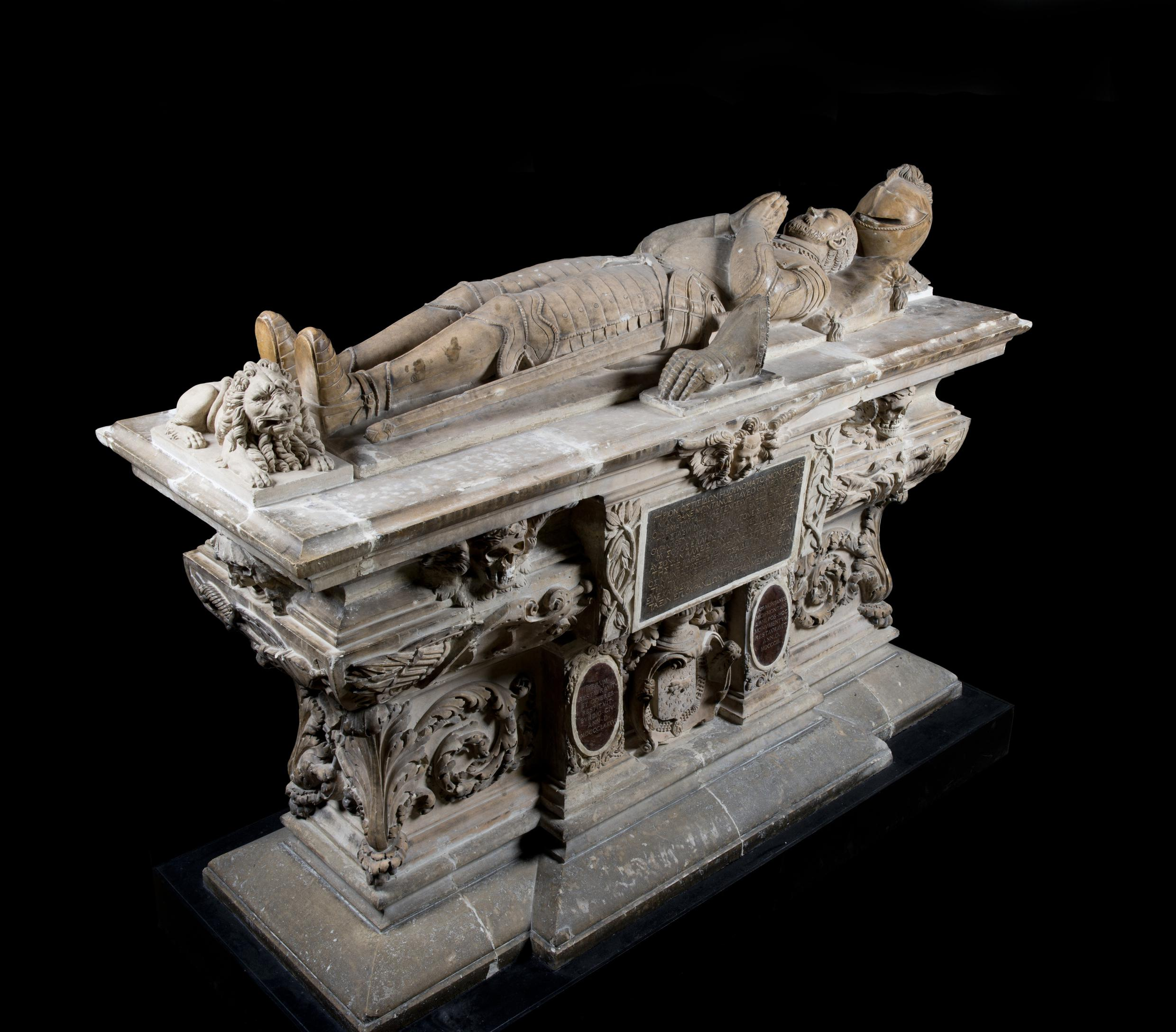 Cénotaphe de Montaigne - Ph. F. David, mairie de Bordeaux